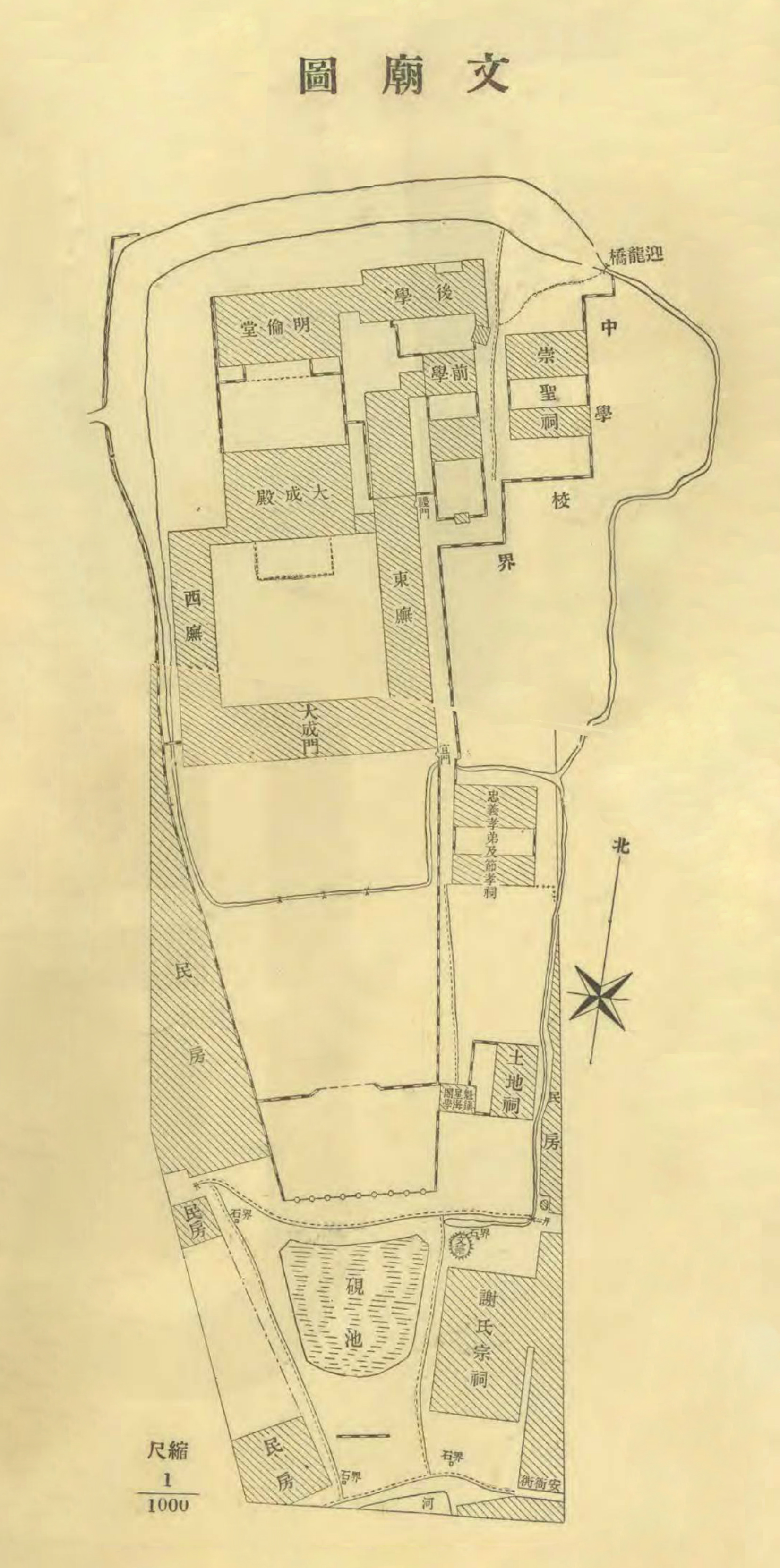 民国二十年（1931）《镇海县志》文庙图（本图使用PS根据原书文庙图上和文庙图下两图拼合而成）。